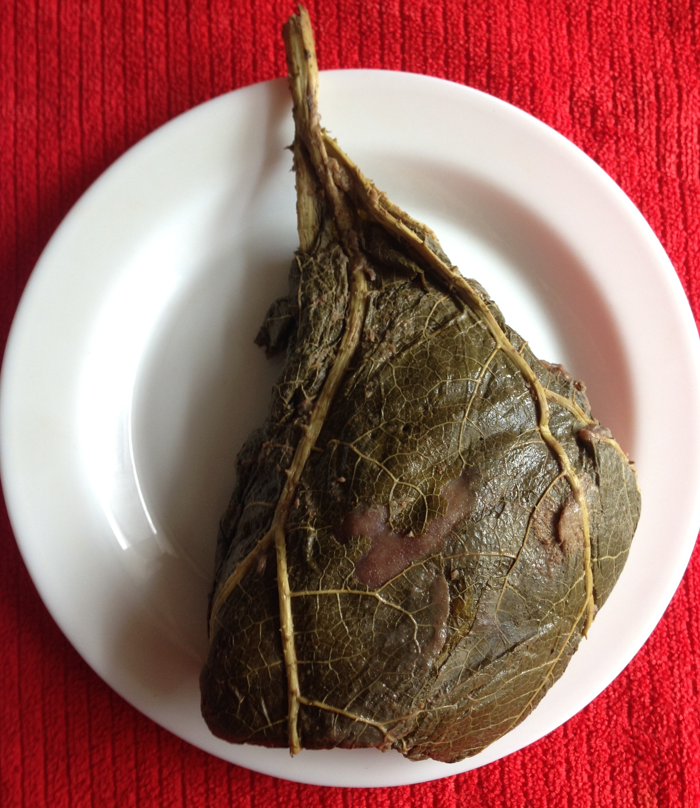 Mella de papa o Chuañe.